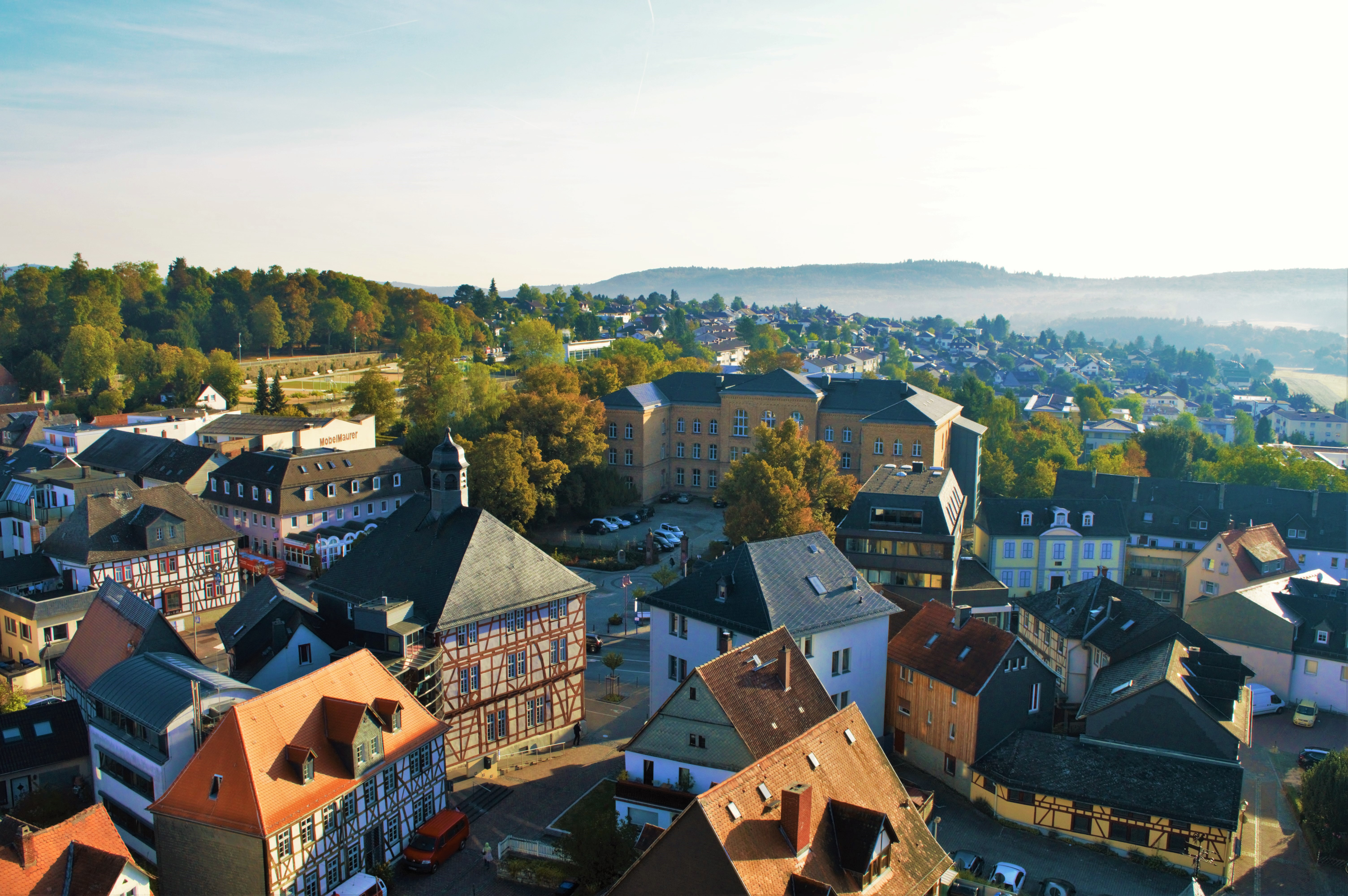 Morgentlicher Blick über Usingen vom Laurentiuskirchturm aus